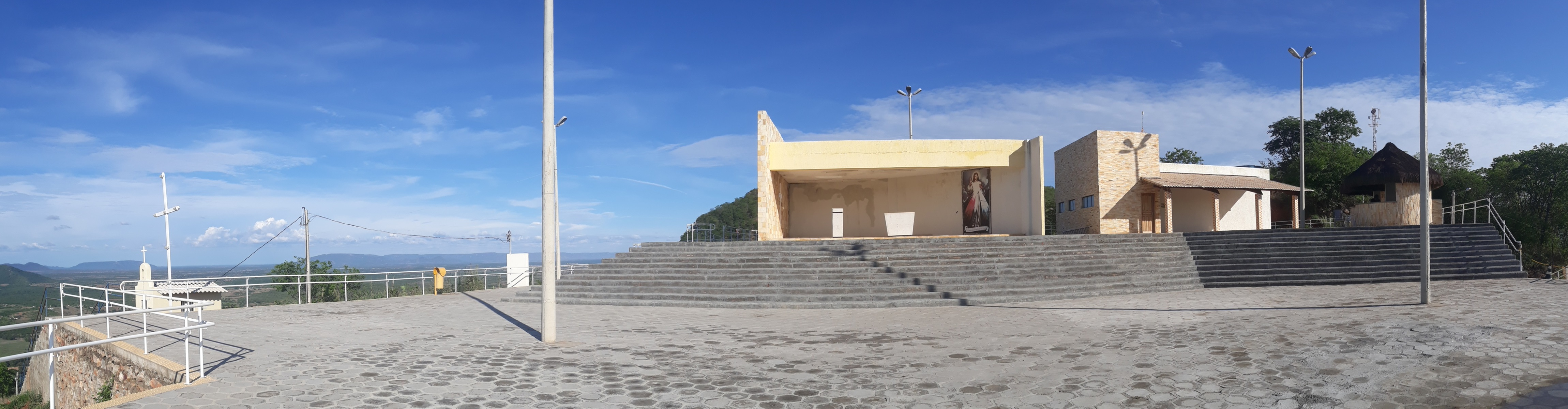 Santuário de São João Batista, com a capelinha à esquerda, situada no alto do serrote do mesmo nome, no município de Encanto, Rio Grande do Norte (Brasil)